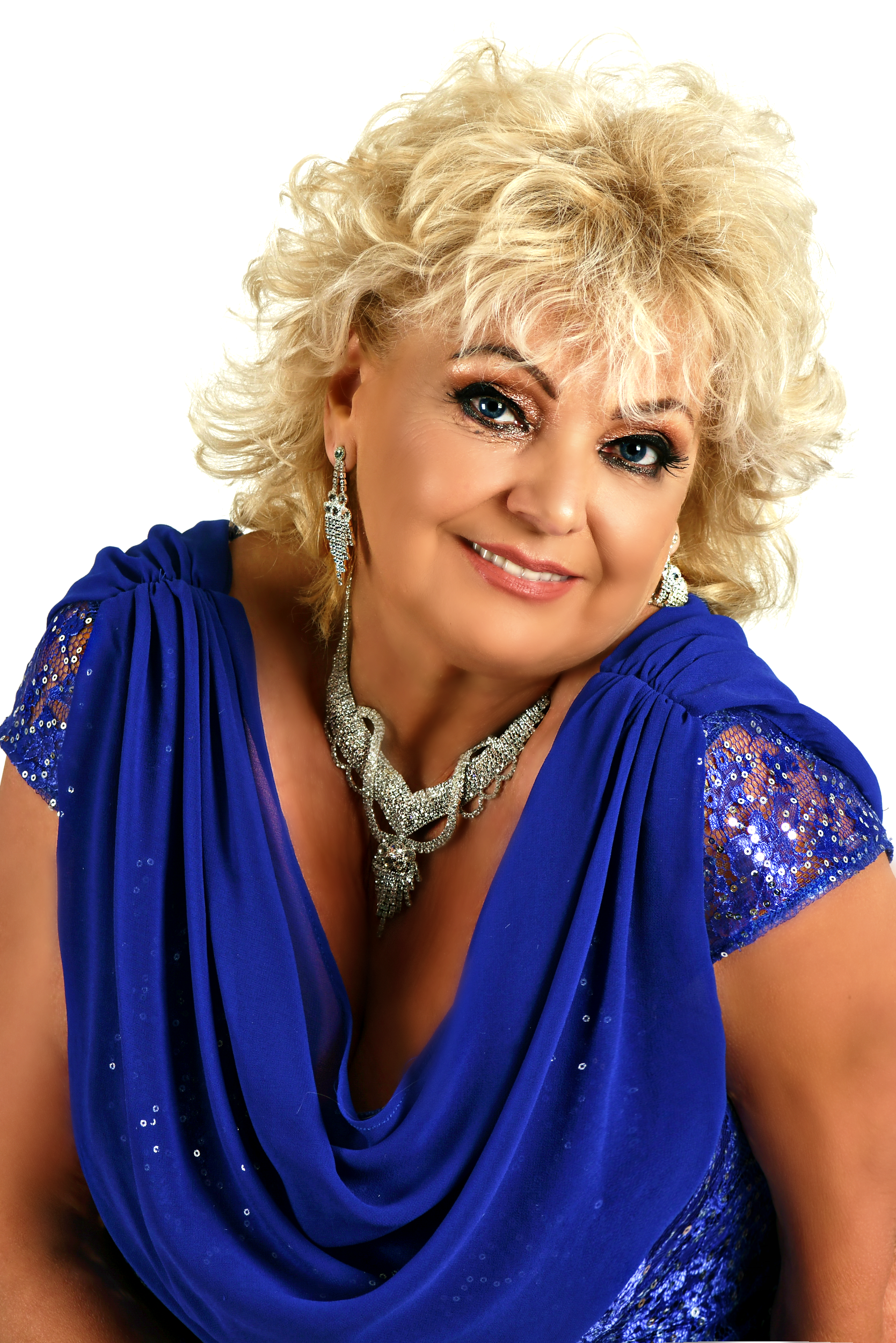 Ankica Utornik Orčić (Jugovo kod Subotice, 1958) dugogodišnja novinarka, prosvetna i humanitarna radnica.